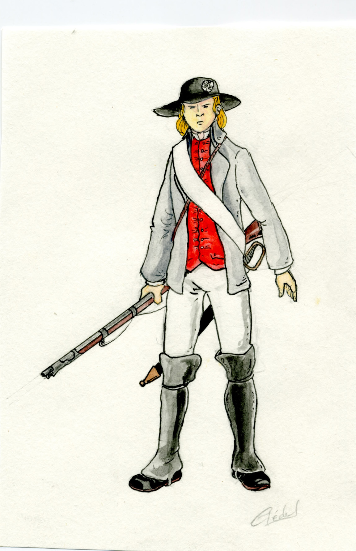 Chouan d'Ille-et-Vilaine